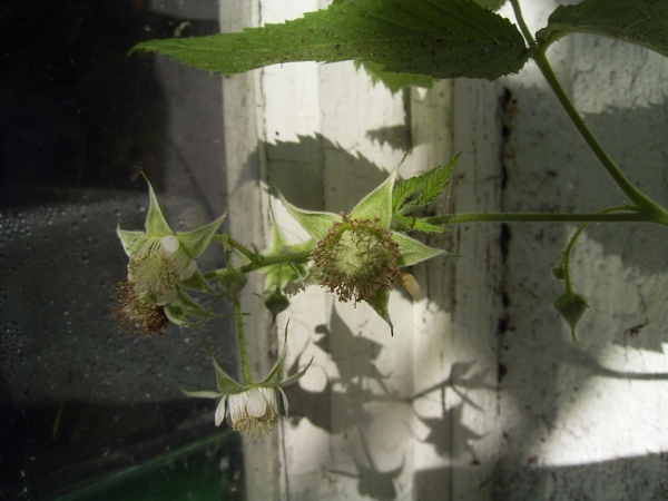 Himbeerblüte